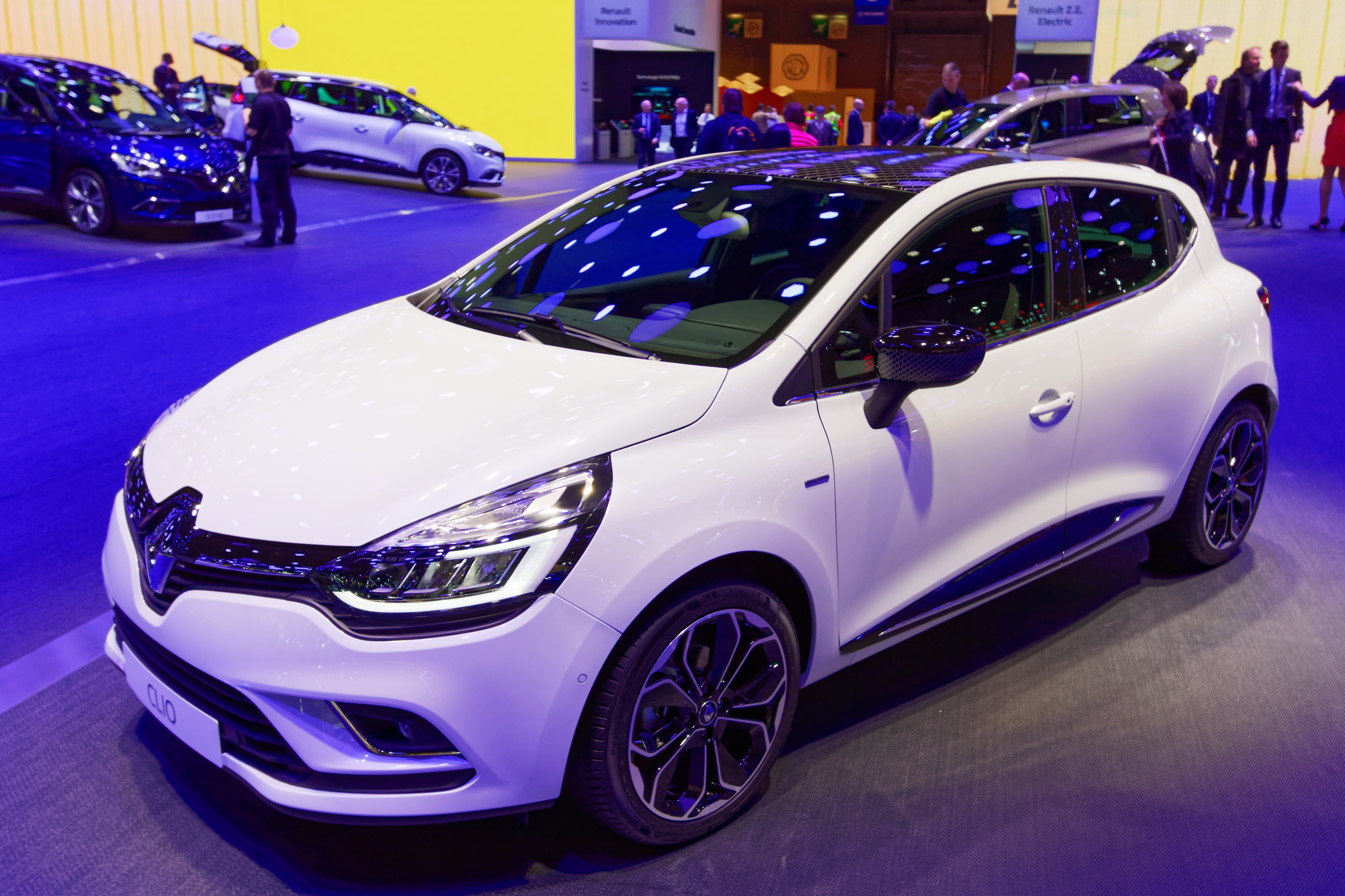 Une Renault Clio présentée lors du mondial de l'automobile de Paris 2016.